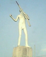 জাগ্রত চৌরঙ্গী ভাস্কর্য,গাজীপুর চৌরাস্তা।